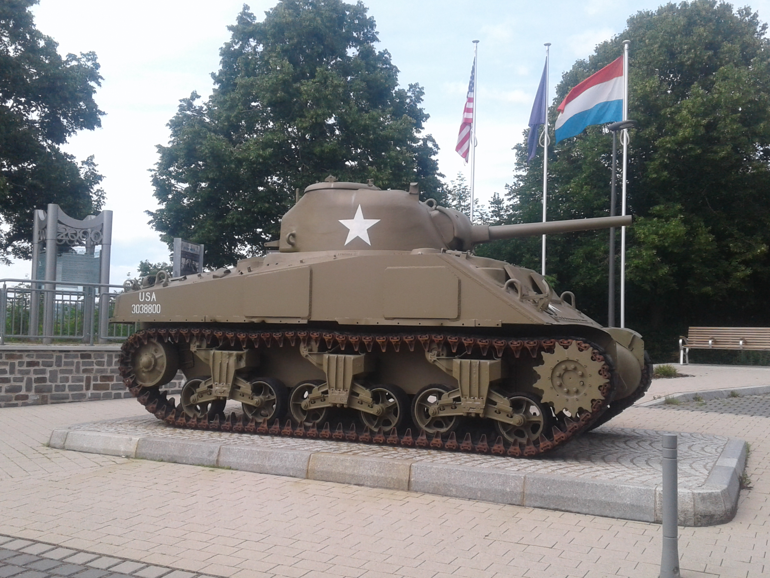 Dieses Bild zeigt das neue Panzerdenkmal von WiltzDepicted place: Tank memorial